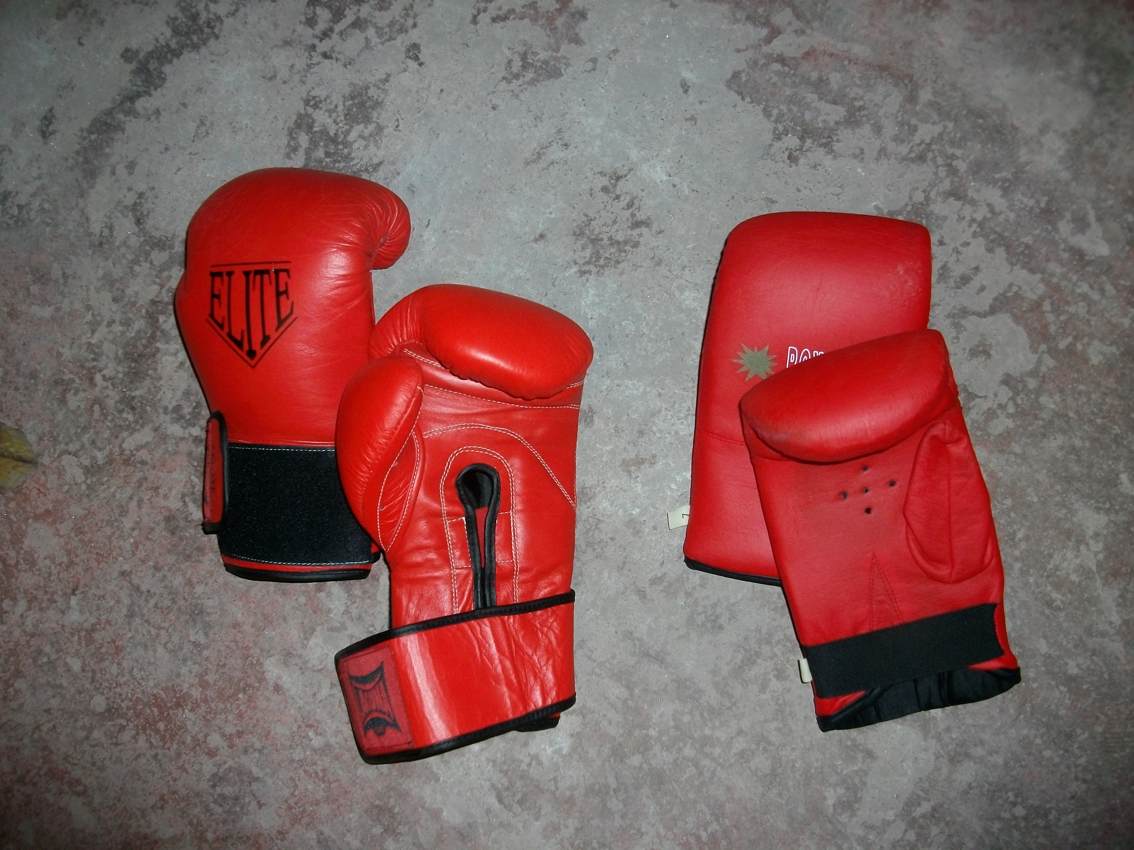 guantes